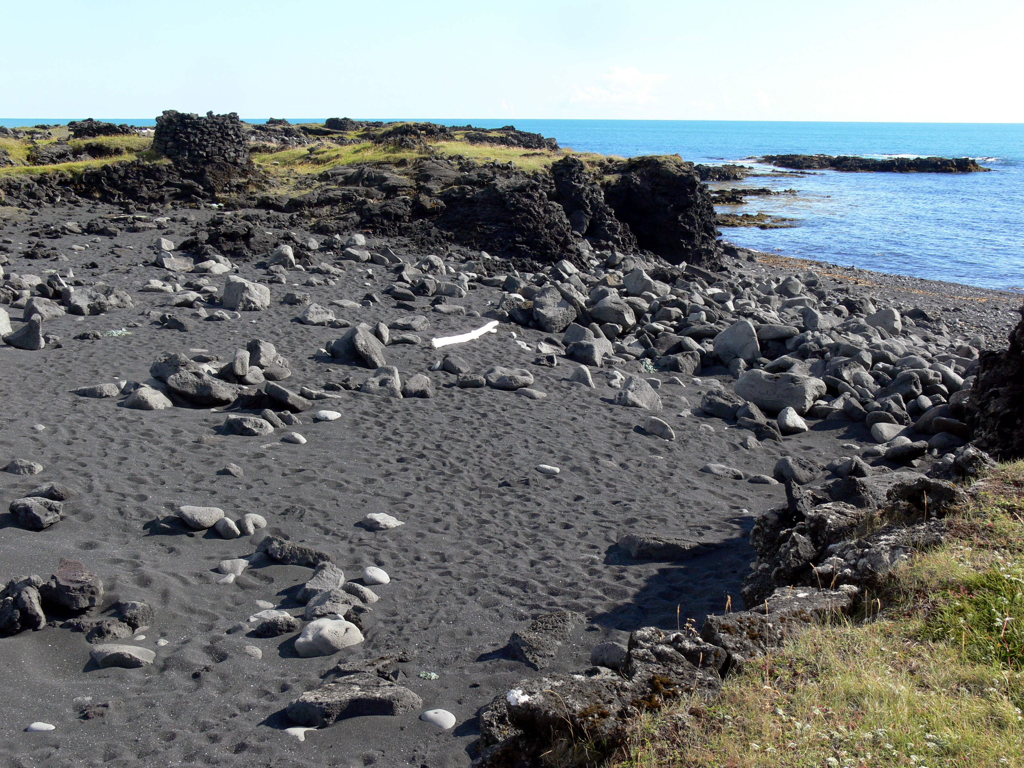 Selatangar auf Reykjanes.